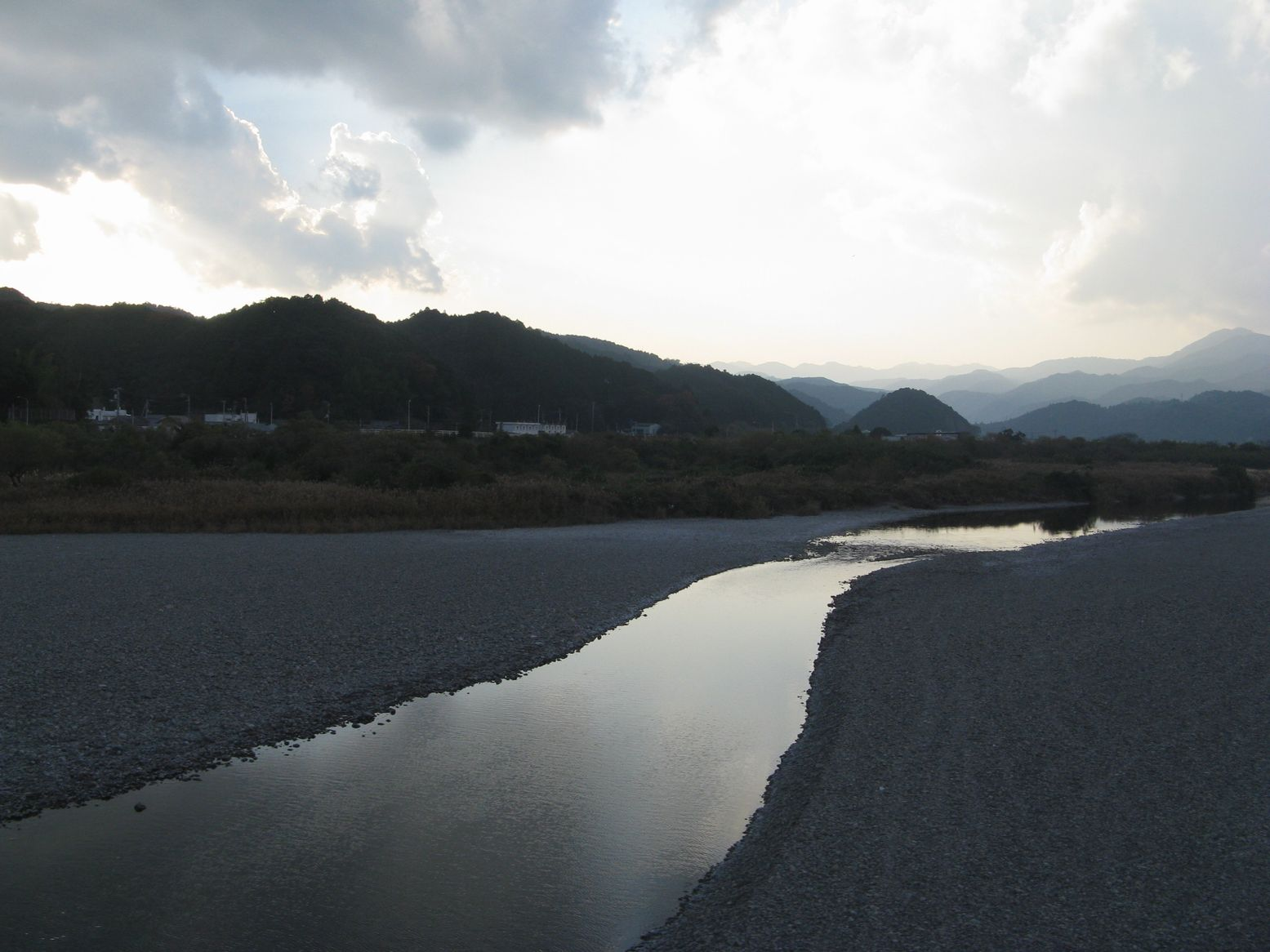 海部川 牟岐線阿波海南駅～海部駅間から北望